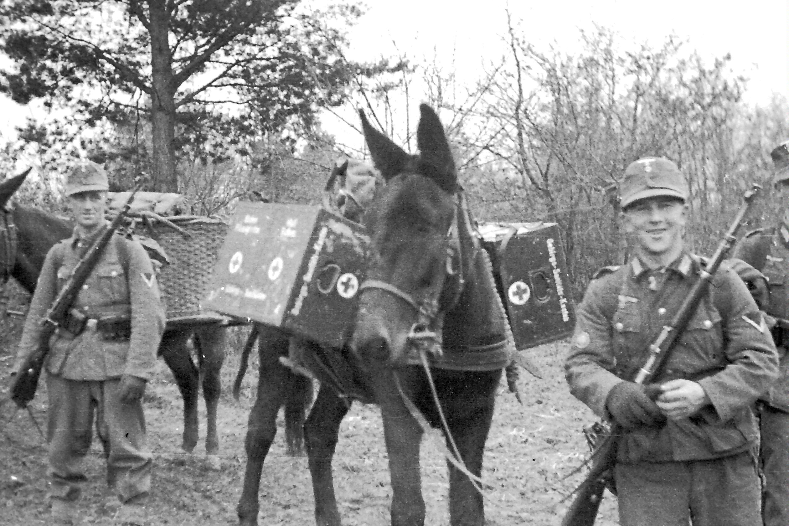 Gebirgssanitäter bei der Gebirgstruppe im 2. Weltkrieg